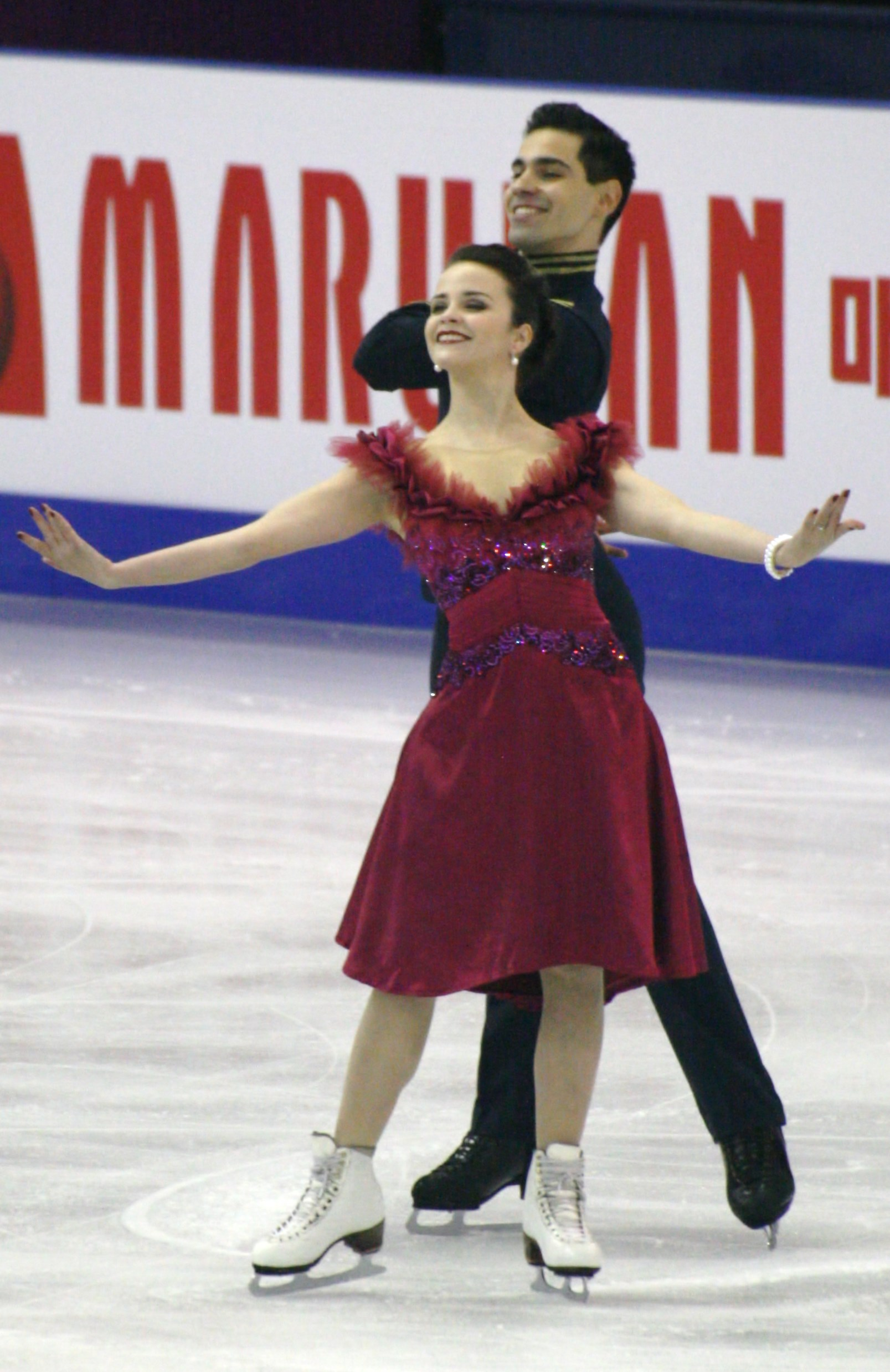 Анна Каппеллини и Лука Ланотте (Италия) на финале Гран-при по фигурному катанию 2015-2016.